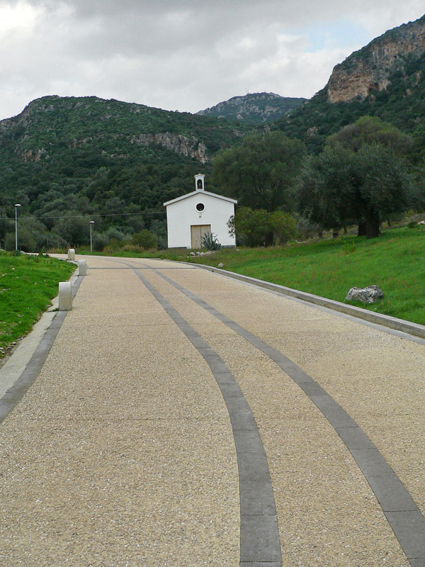 Domusnovas. Chiesa campestre di San Giovanni